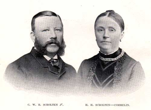 Casper (C.W.R. jr.) en Hendrina H. Scholten-Commelin. Oprichters van het Phytopathologisch Laboratorium Willie Commelin Scholten te Baarn, Netherlands, in nagedachtenis van hun zoon Willie